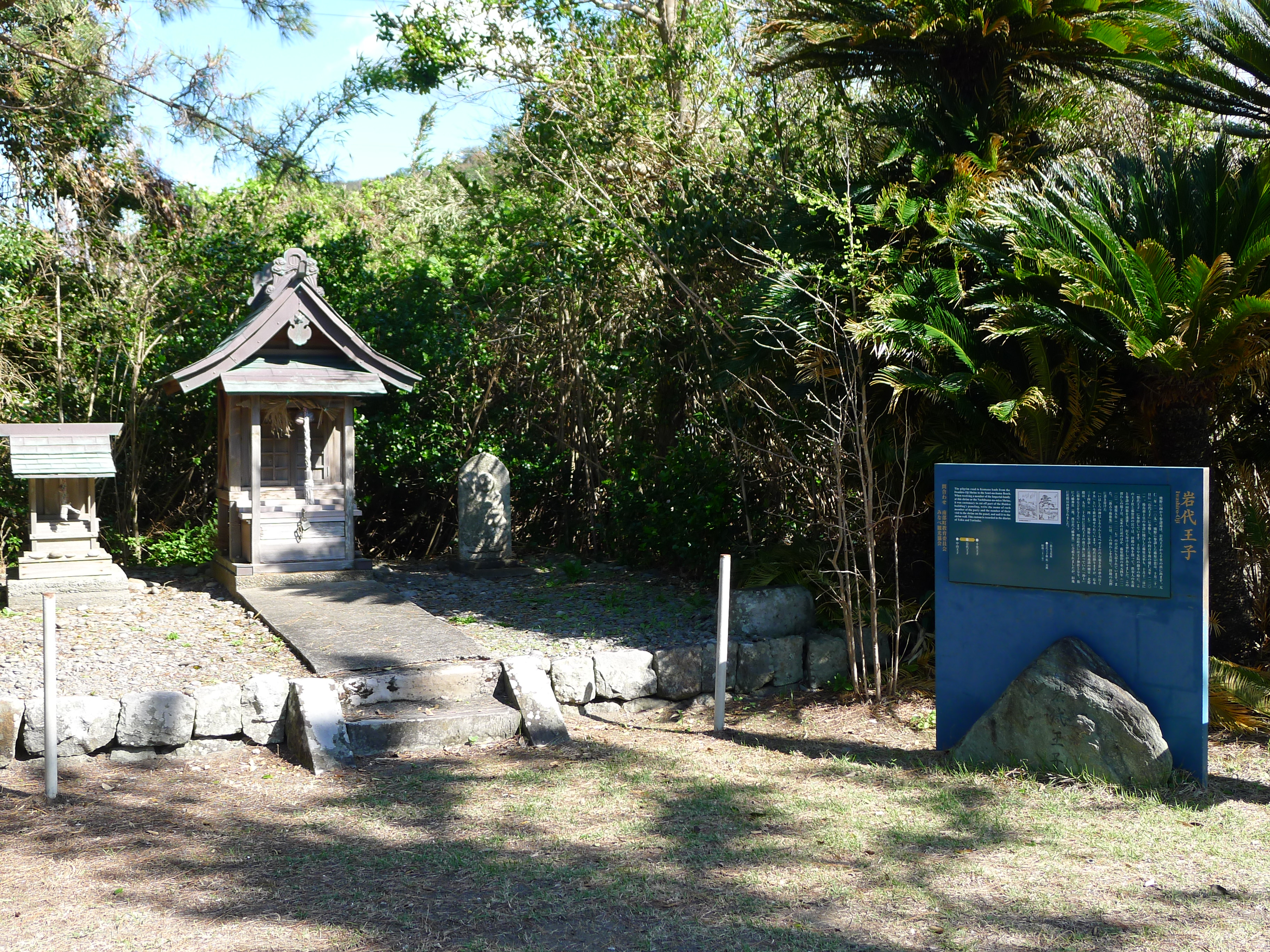 熊野古道・紀伊路の九十九王子の一つ岩代王子（和歌山県みなべ町）